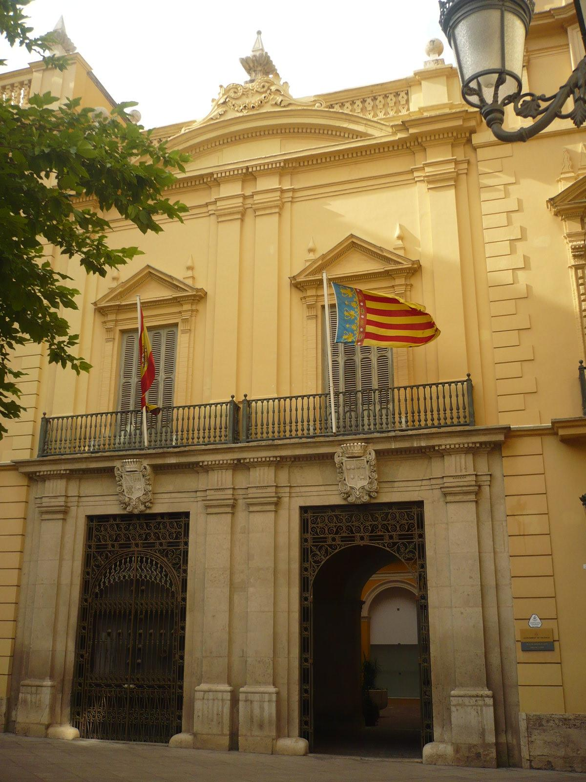 Palacio del Marqués de campo, frente al Palacio Arzobispal en Valencia